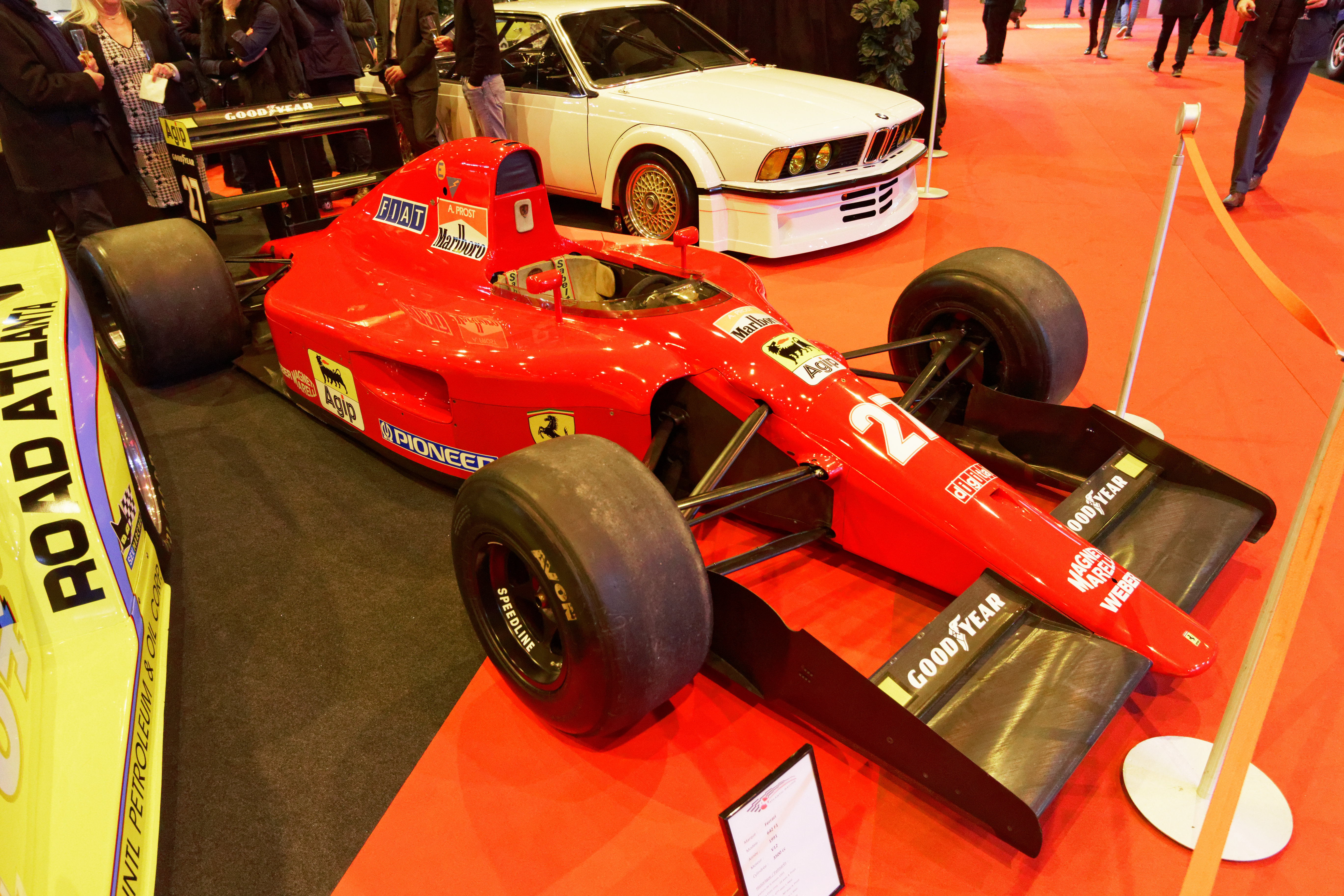 Une Ferrari 642 F1 de 1991 exposée lors du salon Rétromobile 2018.